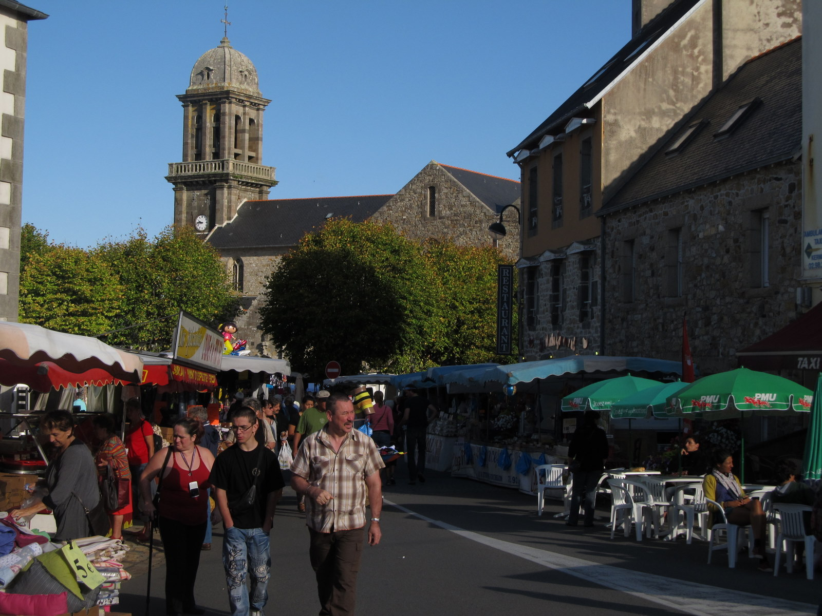 Crozon